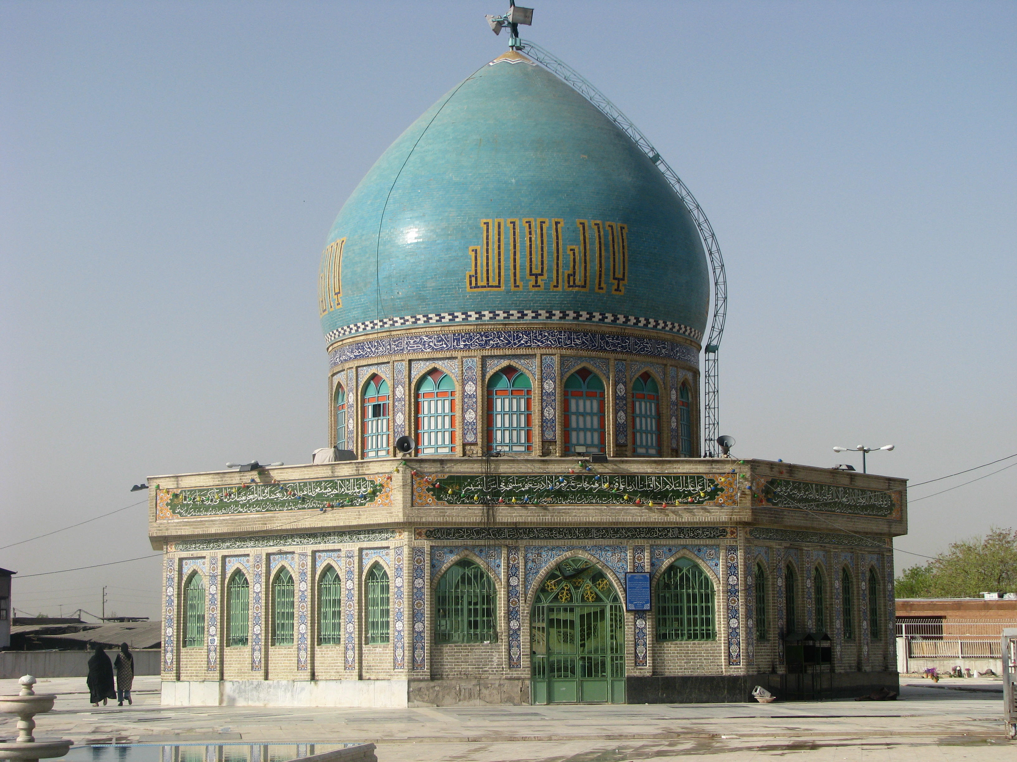 تصویر مربوط به فروردینماه سال هشتاد و هفت است